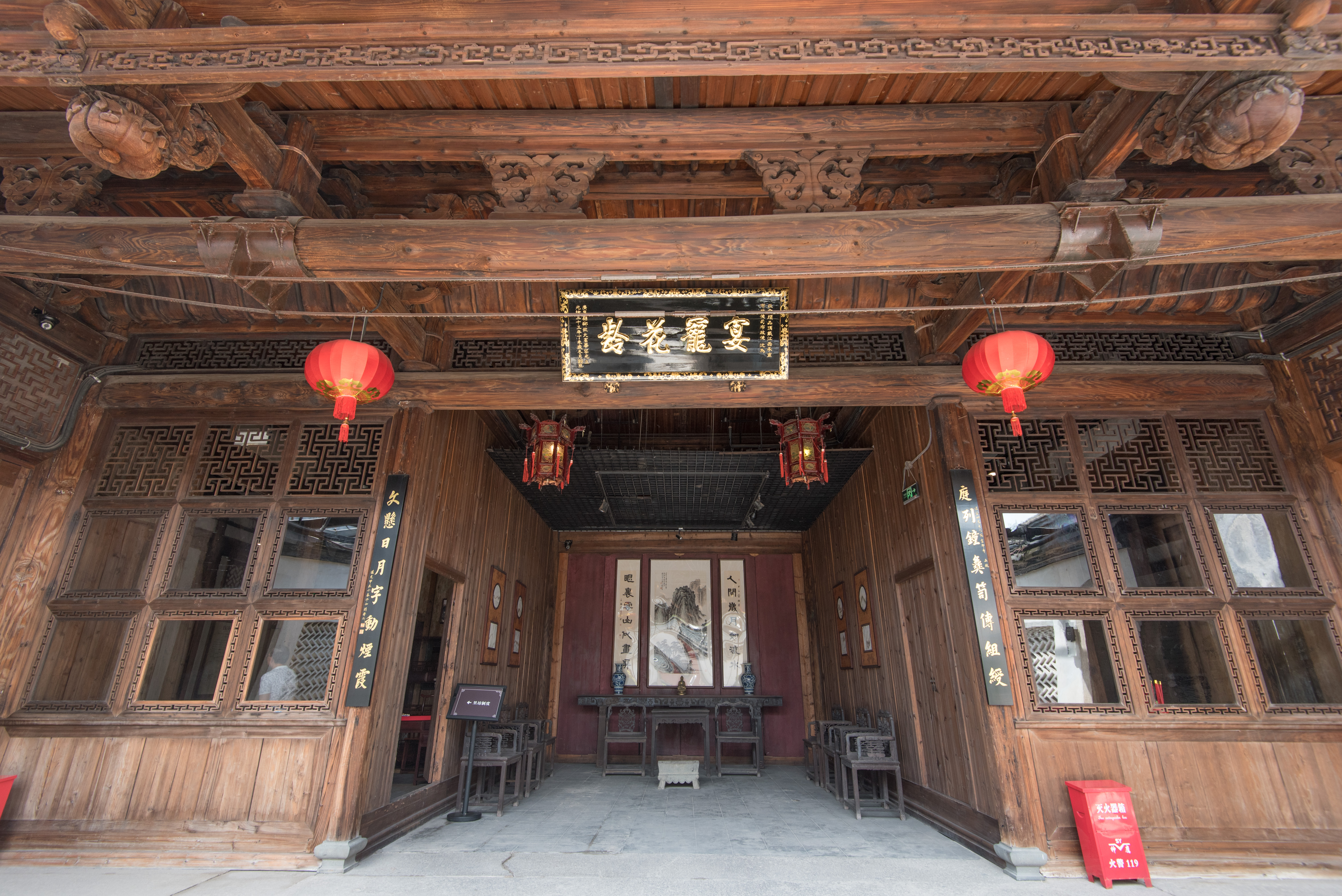 光禄坊刘氏民居